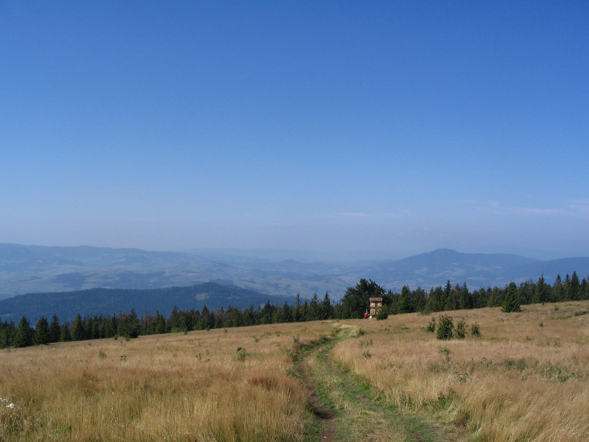 Polana Michurowa - hala na szczycie Ćwilina (Beskid Wyspowy)